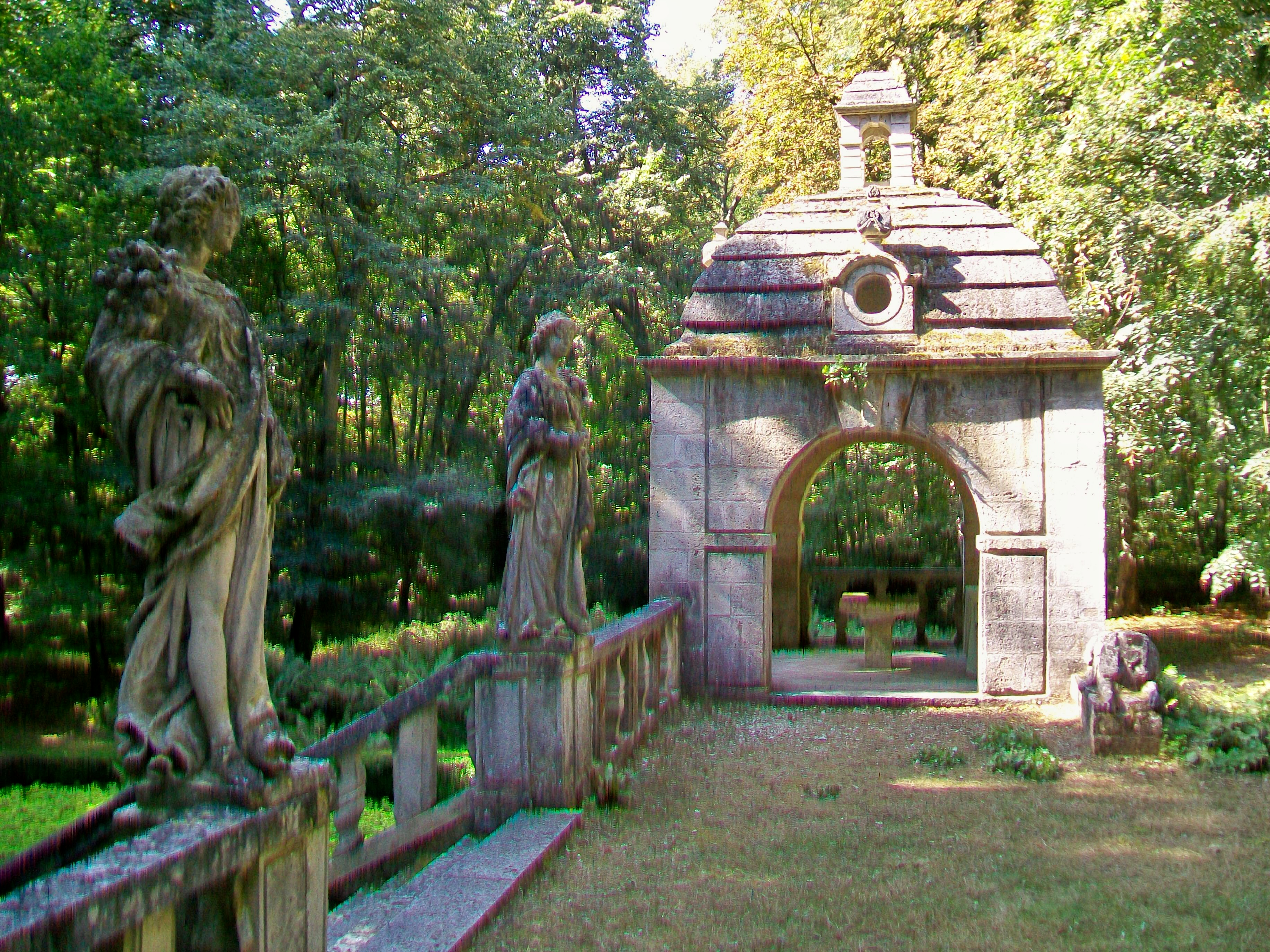 Deux gloriettes encadrent la terrasse en haut du grand escalier, dessinées au XVIIe siècle par Salomon de Brosse ; ici la gloriette située à l'ouest de l'escalier. Ce dernier est dominé par deux statues symbolisant des Vertus ; les deux autres Vertus se trouvant à mi-hauteur de l'escalier.